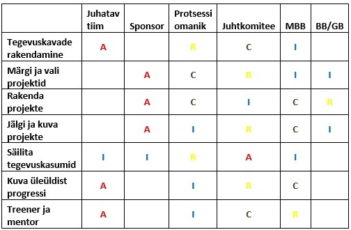 Kuue sigma rollide ja kohustuste